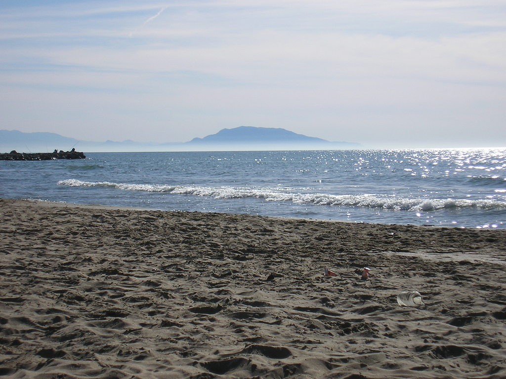 Zeralda, plage des sables d'or et en arrière plan le mont Chenoua.